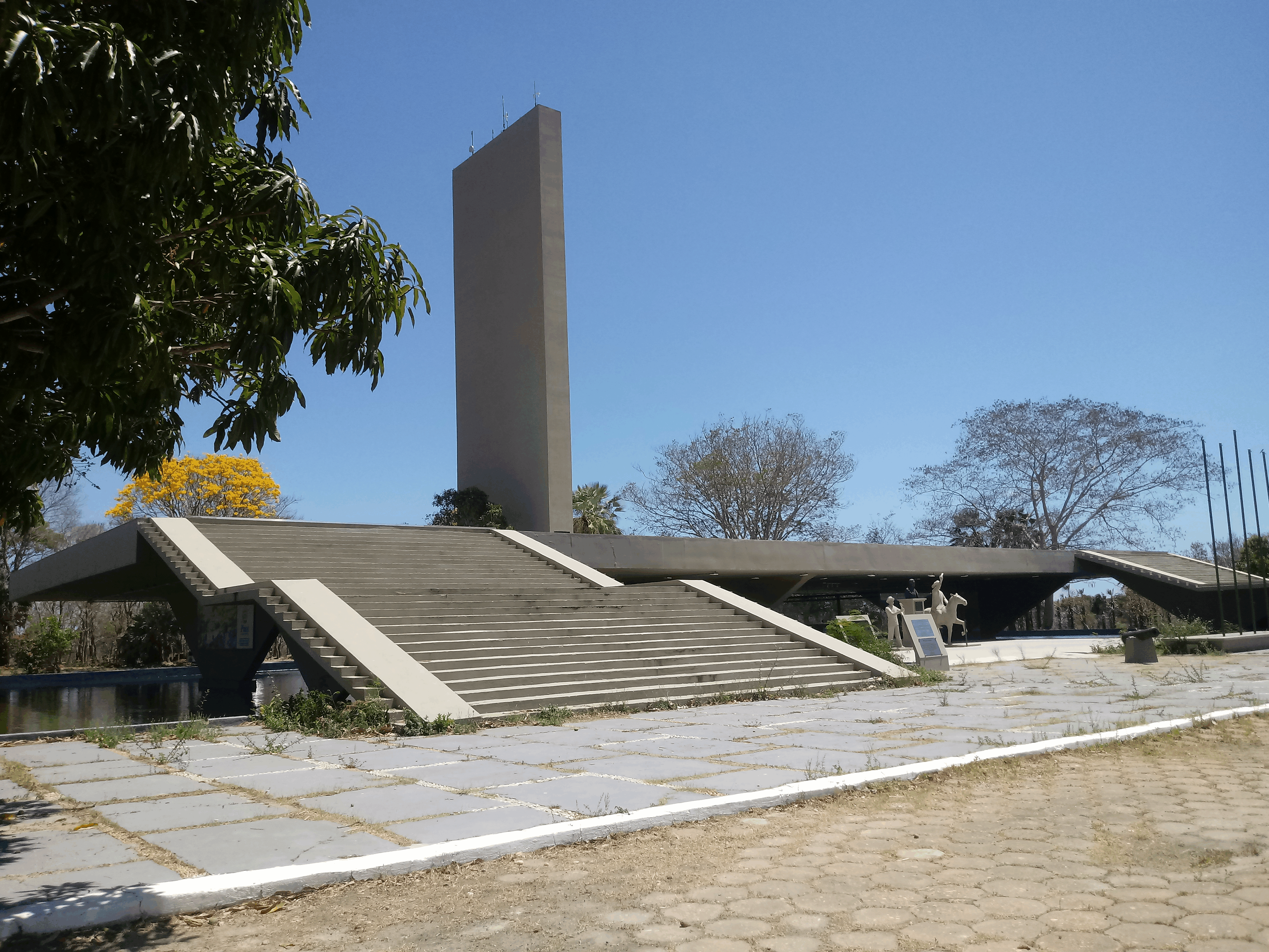 Monumento Jenipapo, Campo Maior/Piaui